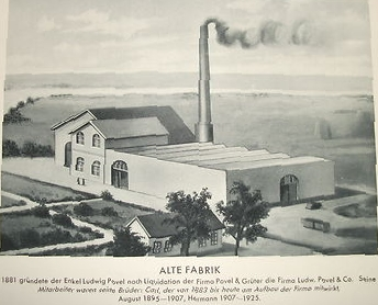 Nordhorn